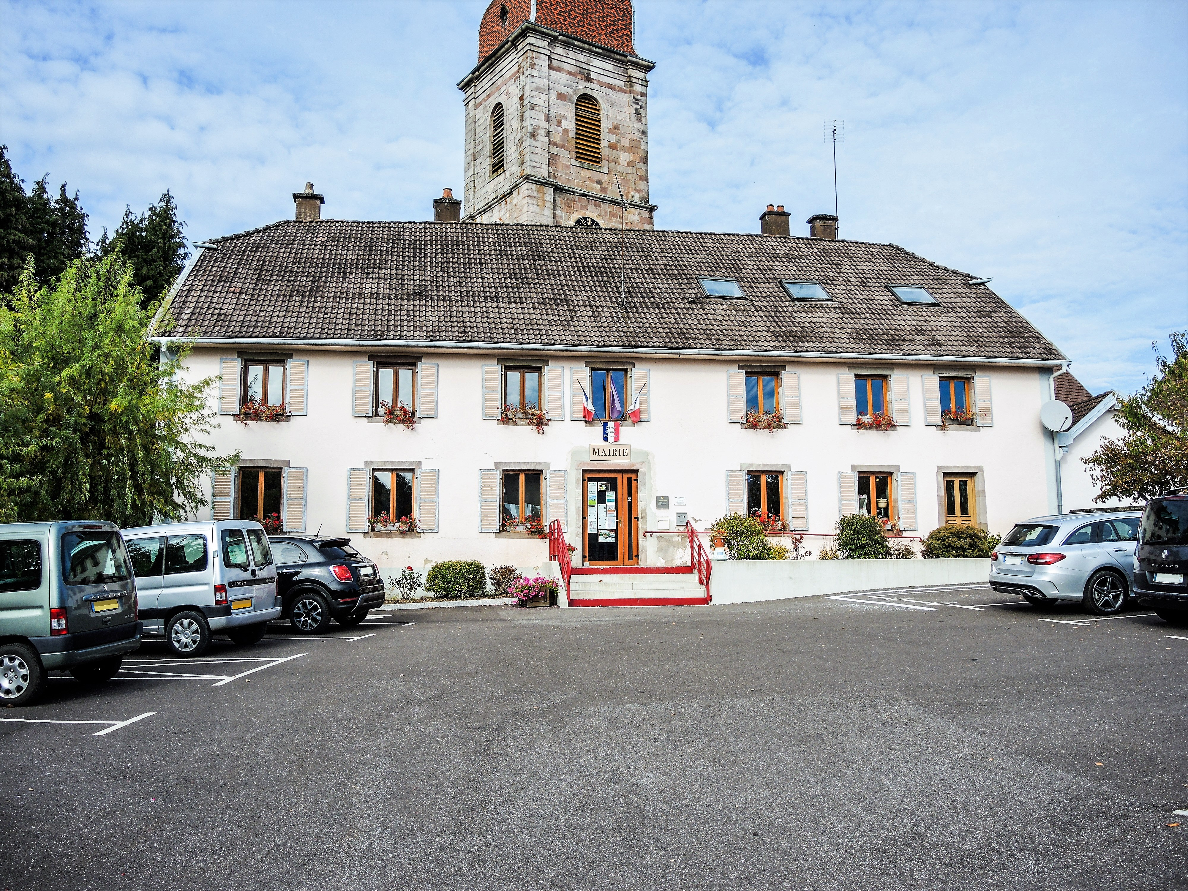 Façade de la mairie de Plancher-Bas. Haute-Saône.